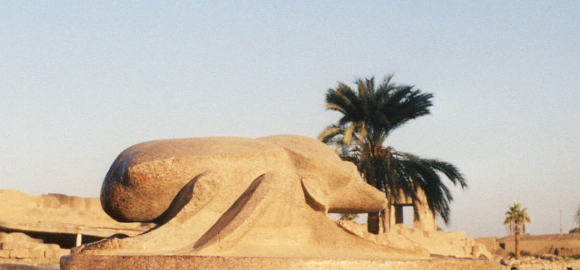 Autore: Hotepibre (Giuseppe); LocalitÃ e data: Karnak, dicembre 2000; Soggetto: la statua colossale di Khepri